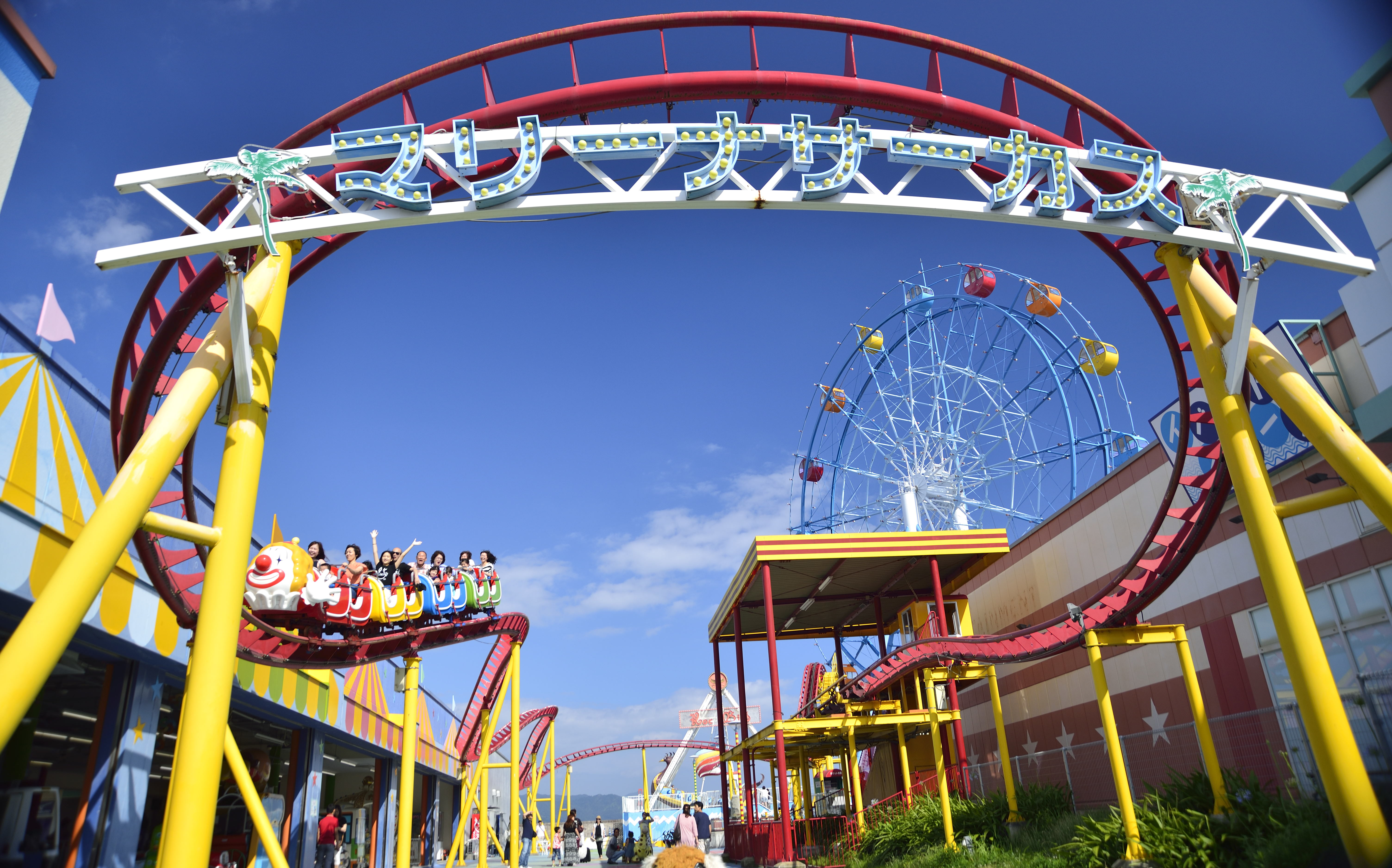 ピエロコースターと観覧車が目印